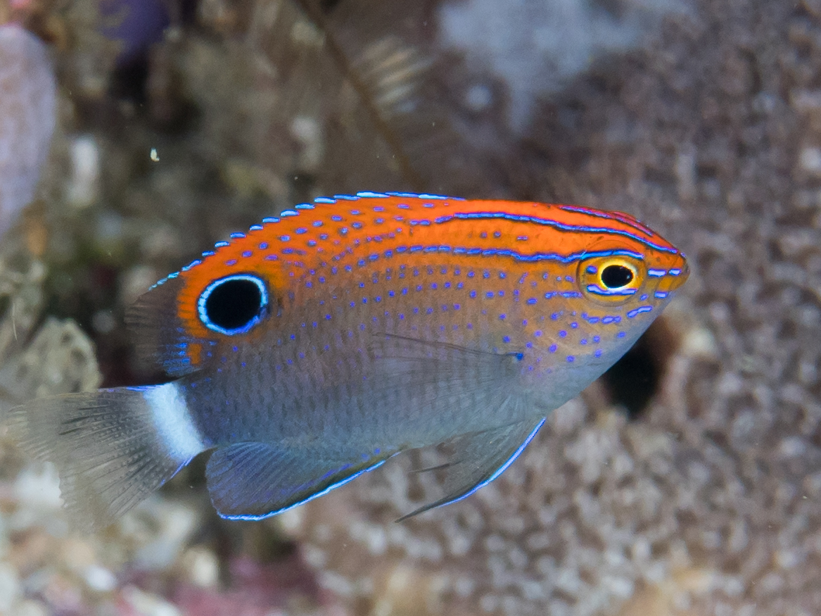 Morotai, Indonesia - Speckled damsel (Pomacentrus bankanensis)